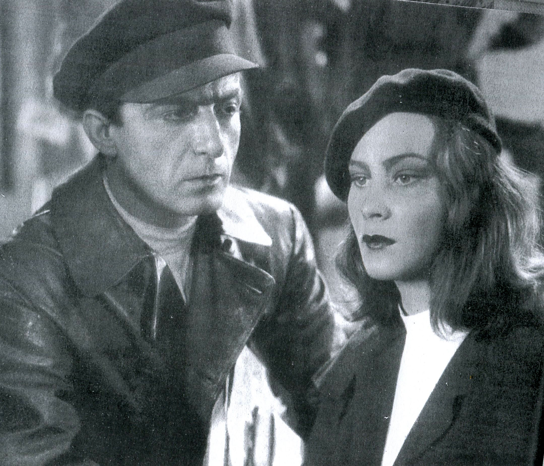 Fosco Giachetti ed Alida Valli in una scena di "Noi vivi - addio Kira" (Alessandrini, 1942)